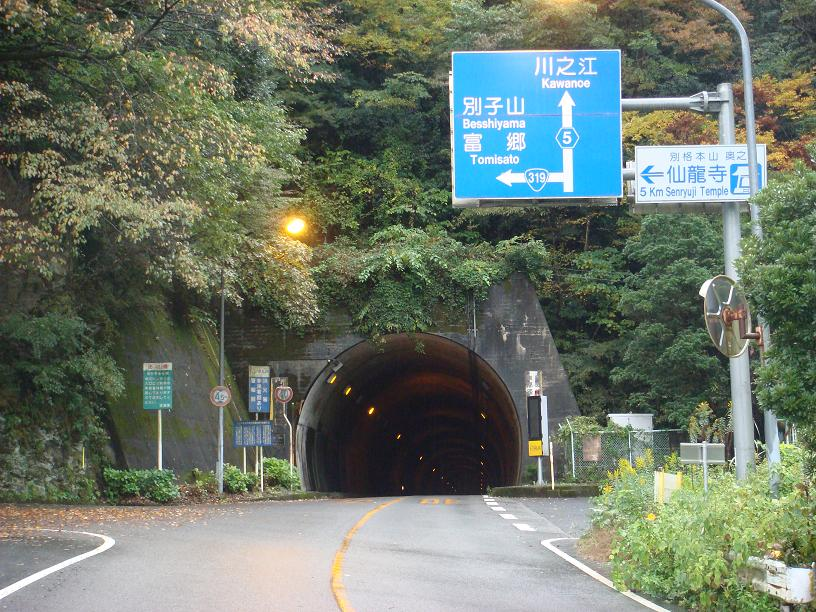 愛媛県四国中央市新宮町で撮影した堀切トンネル